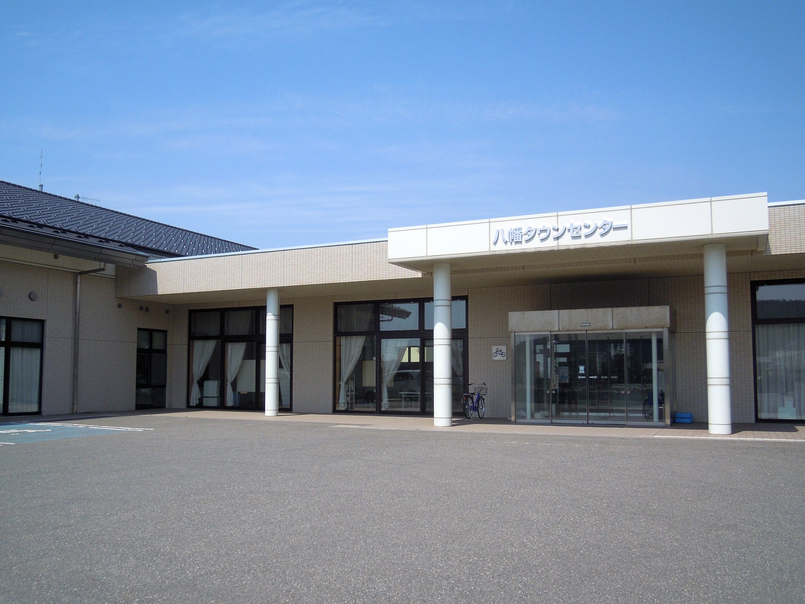 山形県酒田市にある八幡タウンセンターの外観